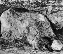 Монтеспанский медведь - глиняная статуя медведя, к которой ориентировочно 35-30 тыс. лет до н.э. был прикреплен настоящий череп медведя